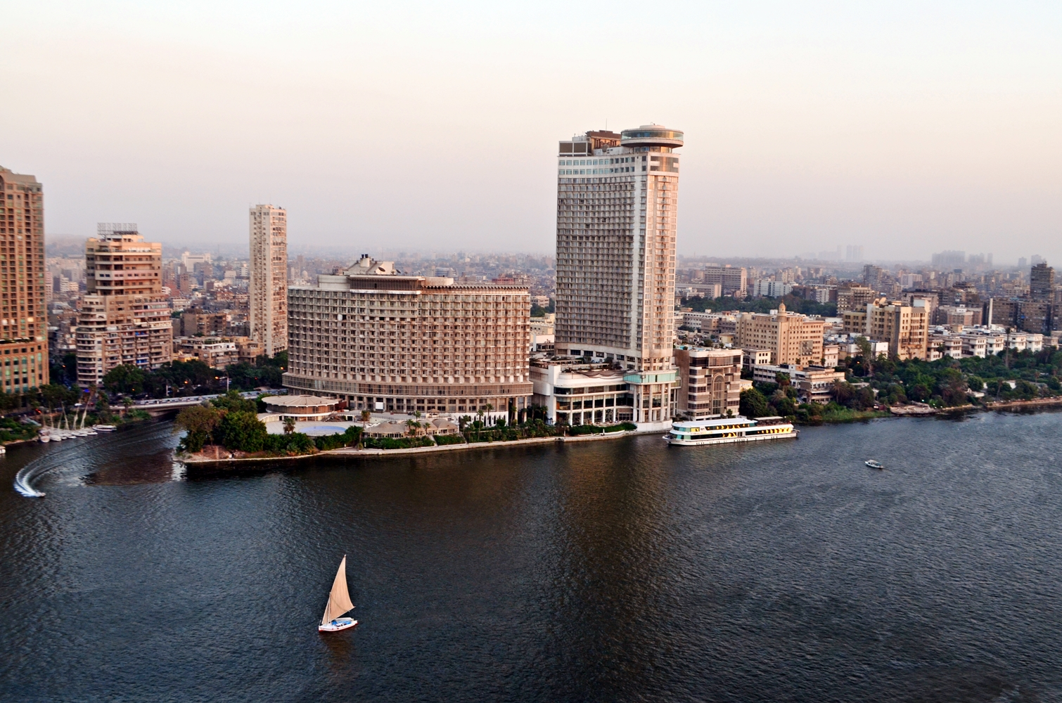 النيل في القارة وقت الغروب، مصر